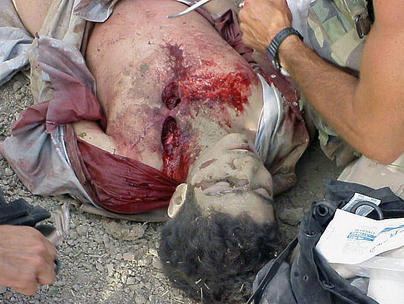 Omar Khadr getting battlefield first aid.